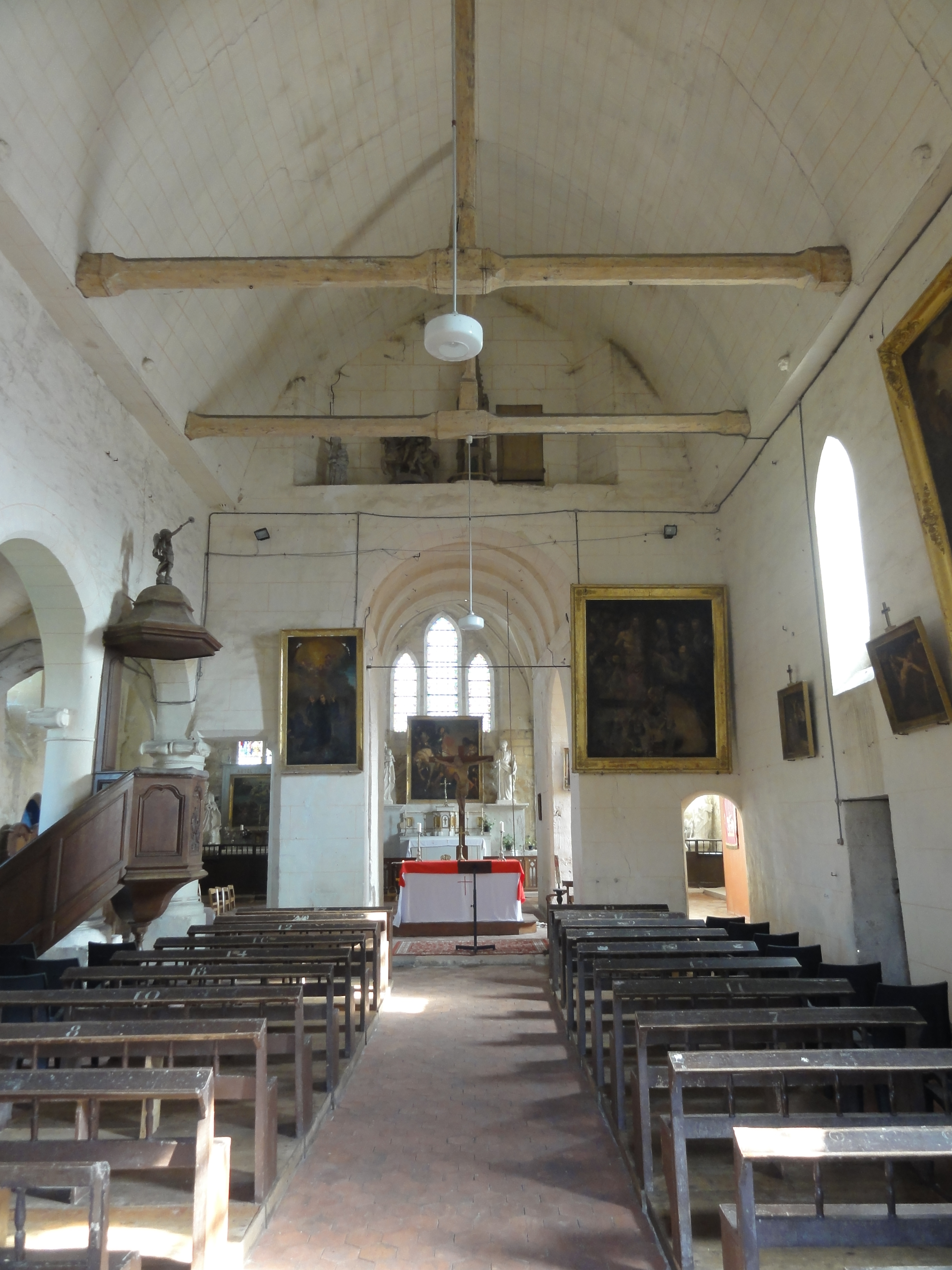 Intérieur de l'église - voir titre.